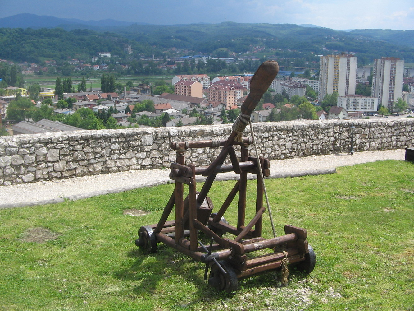 Katapult na dobojskoj tvdjavi Gradina.